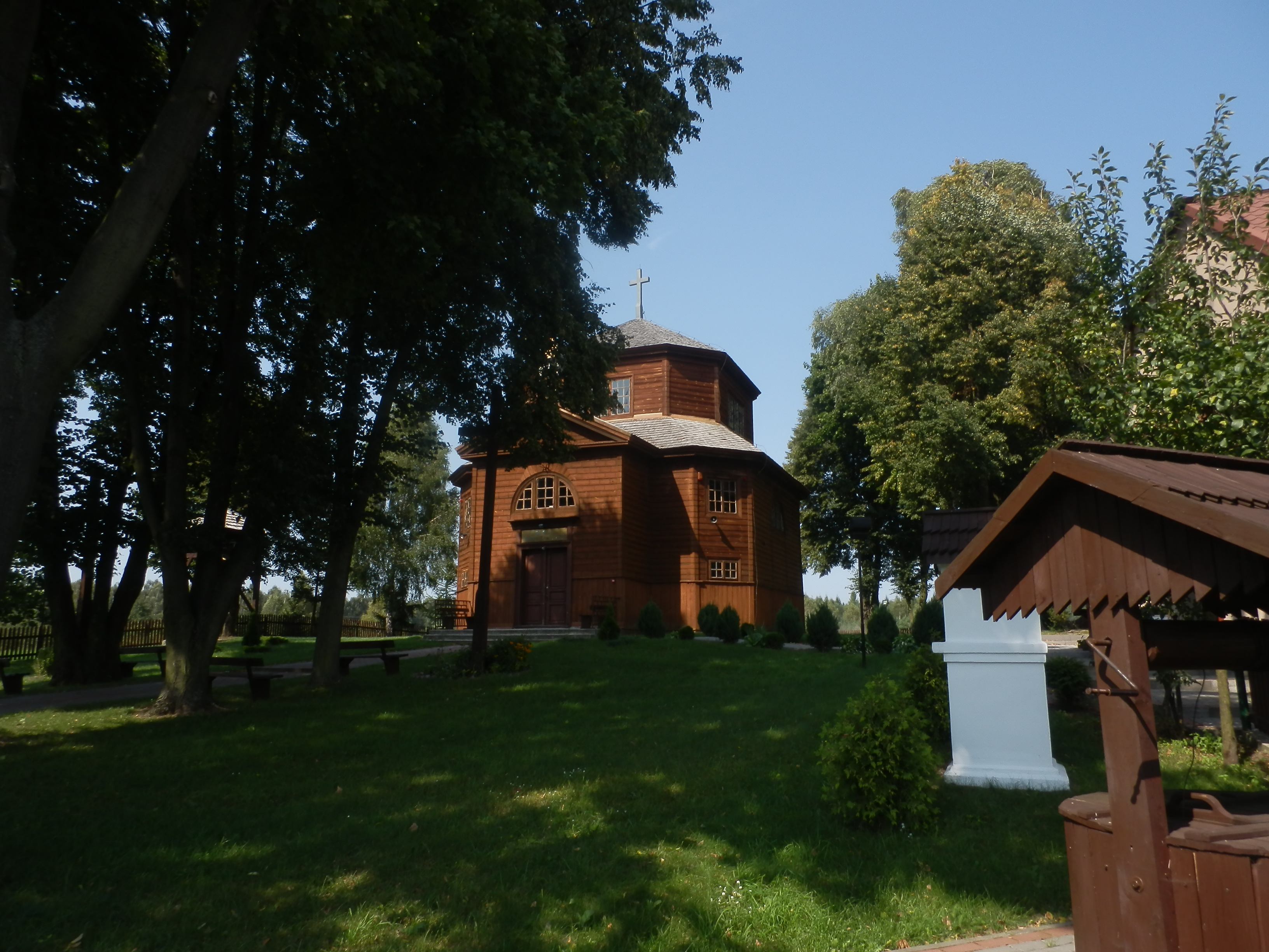 Kościół w Borowicy